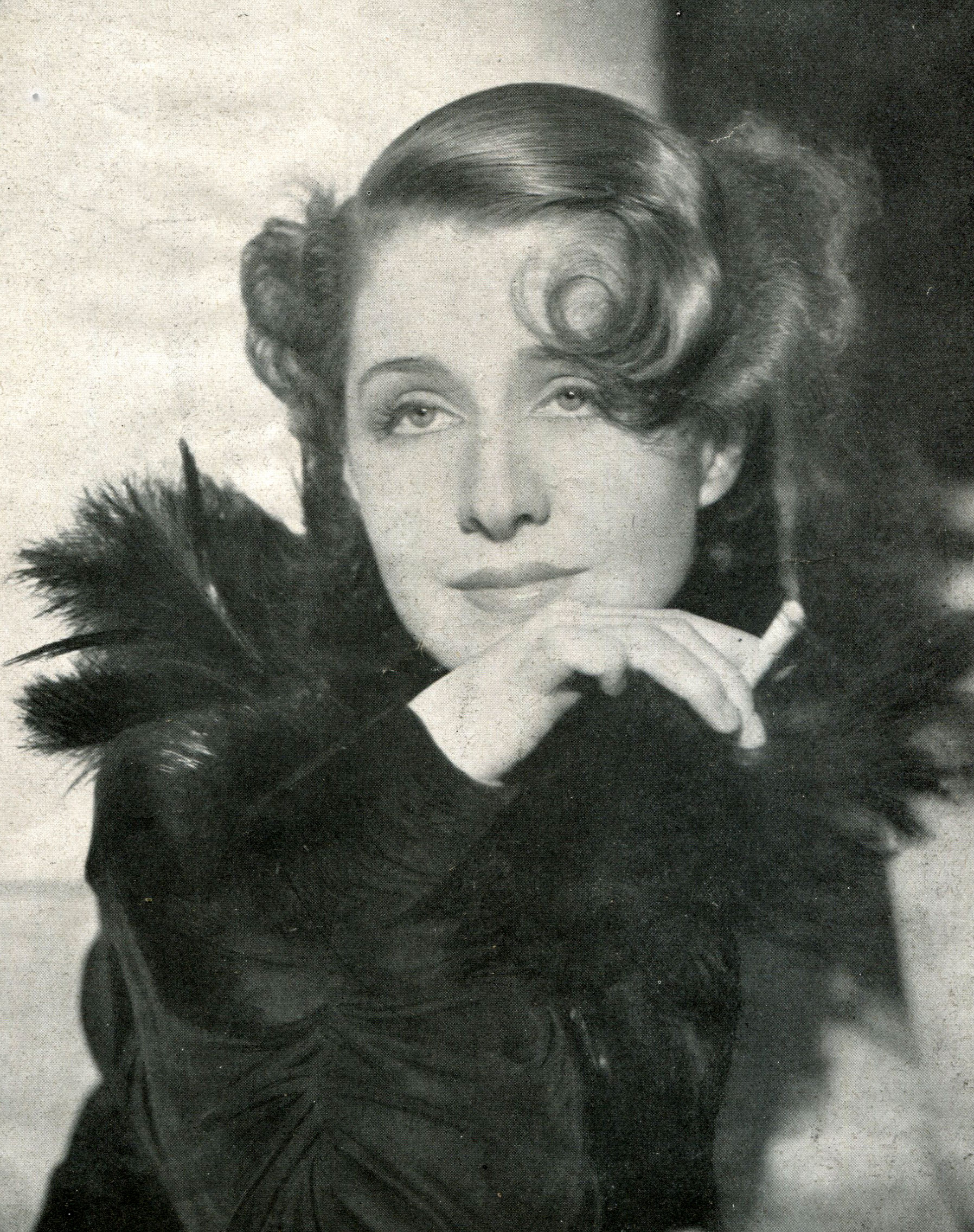 L'attrice Norma Shearer in un'immagine pubblicata in Italia nel 1934